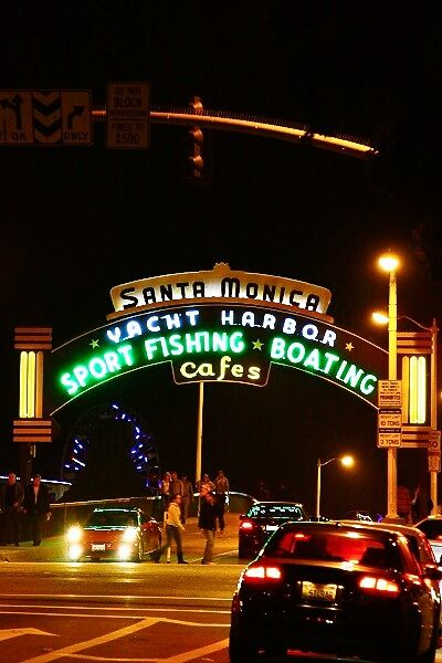 サンタモニカ・ピアへの入り口